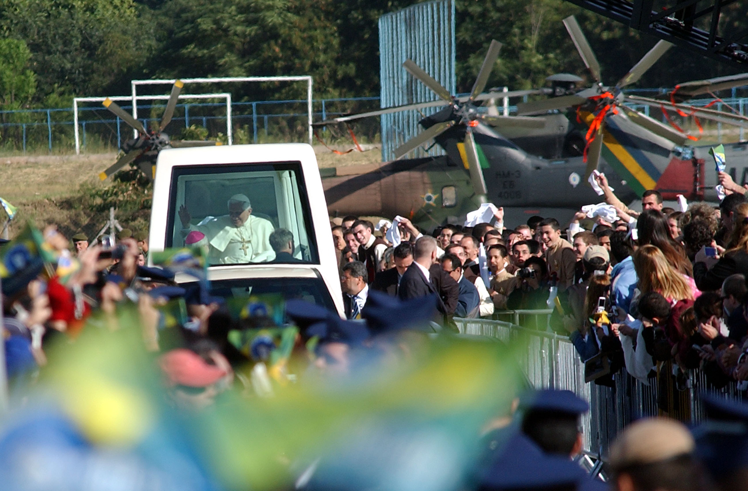 Cerimônia de canonização do frade brasileiro Frei Galvão celebrada pelo papa Bento XVI no Campo de Marte em São Paulo, Brasil.